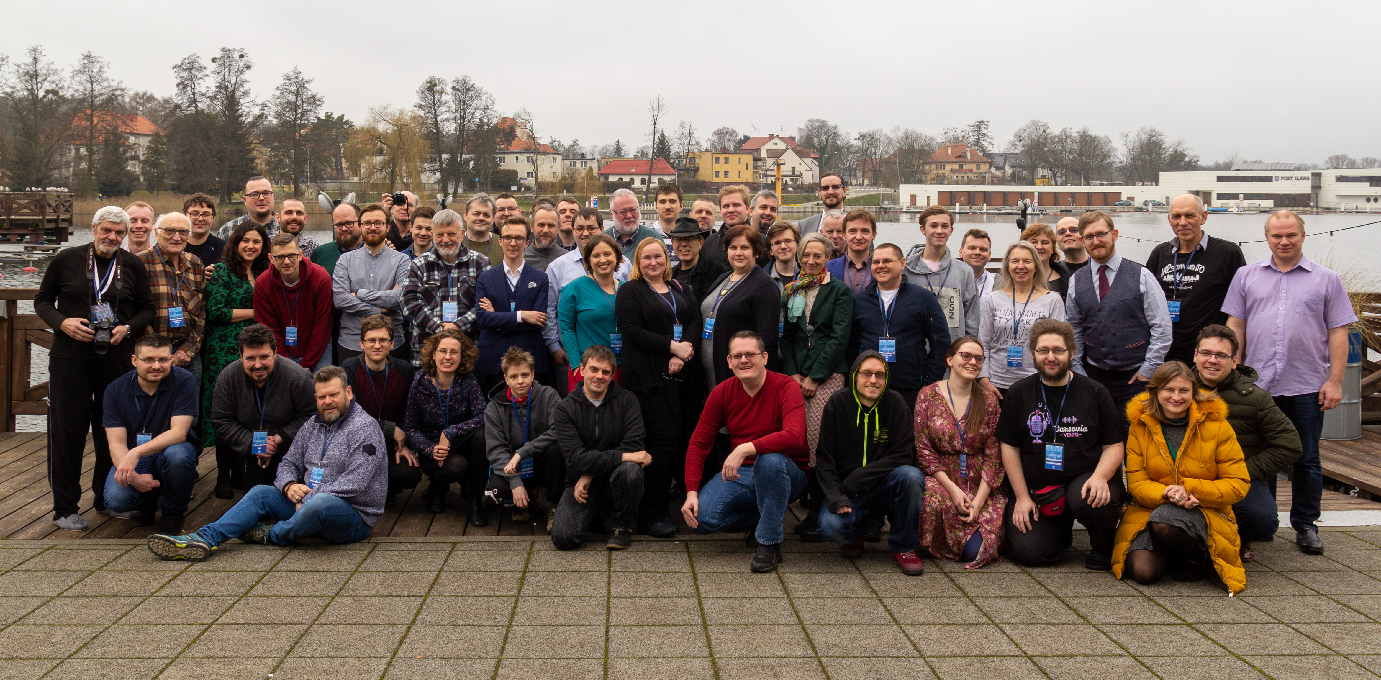 Zlot Zimowy 2020 - spotkanie polskich Wikimedian w Iławie, 24-26 stycznia 2020